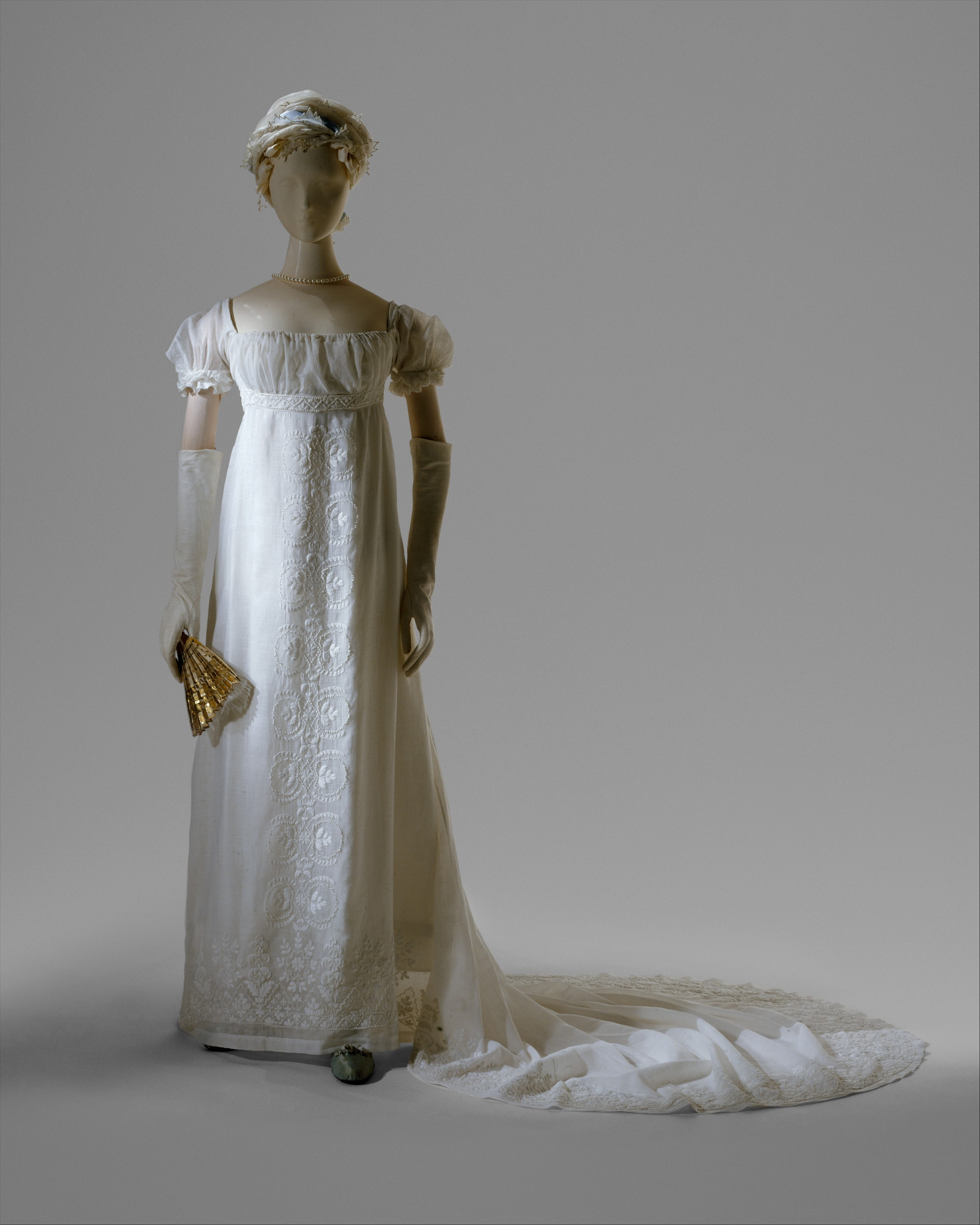 French; Evening dress